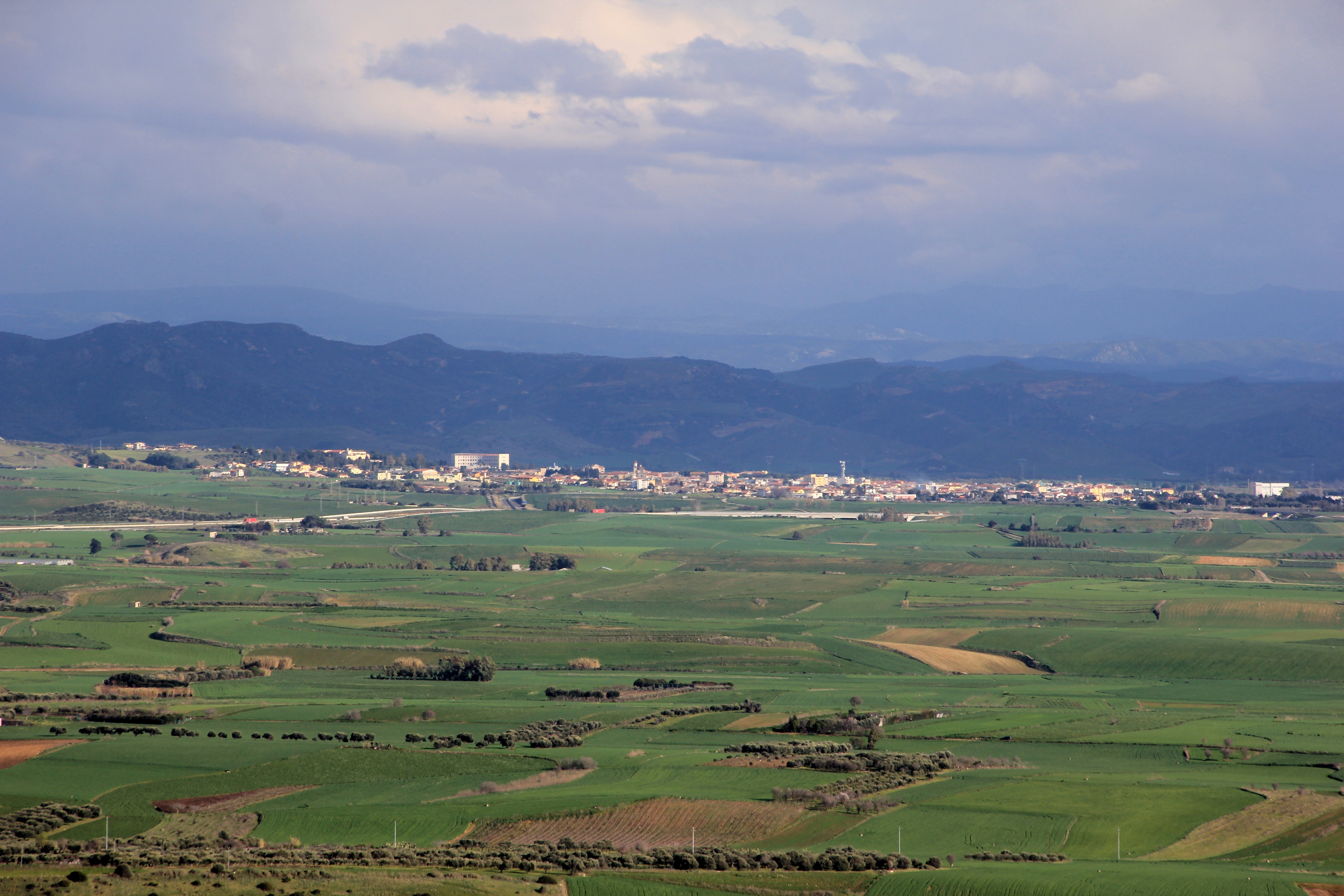 Sanluri - Panorama